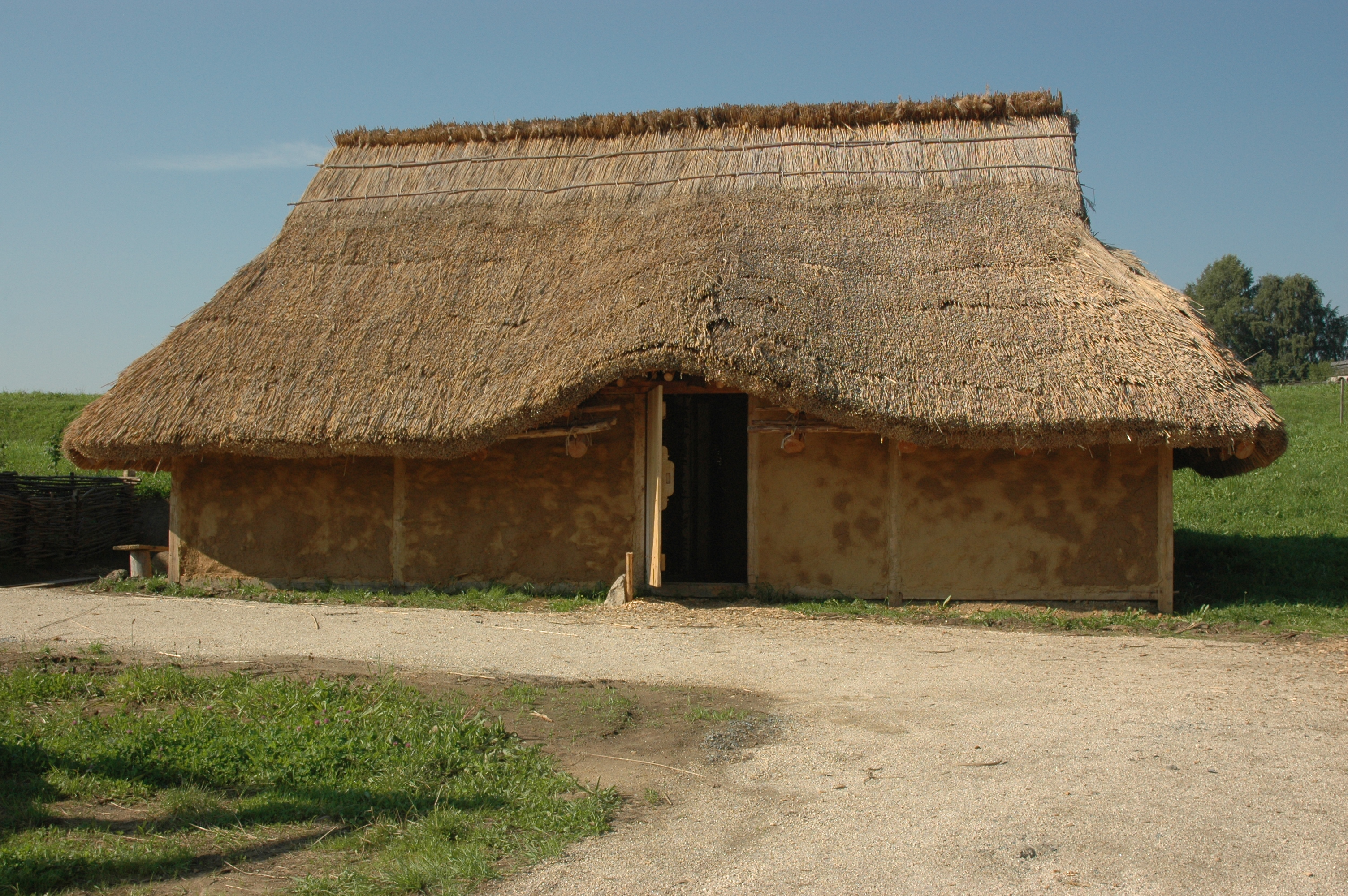 Slawisches Pfostenhaus in der frühmittelalterlichen Siedlung des Geschichtsparks Bärnau-Tachov